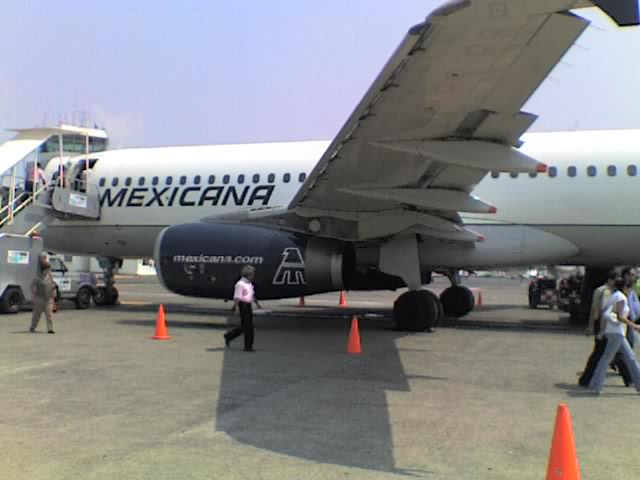 Mexicana's A320 at VER.